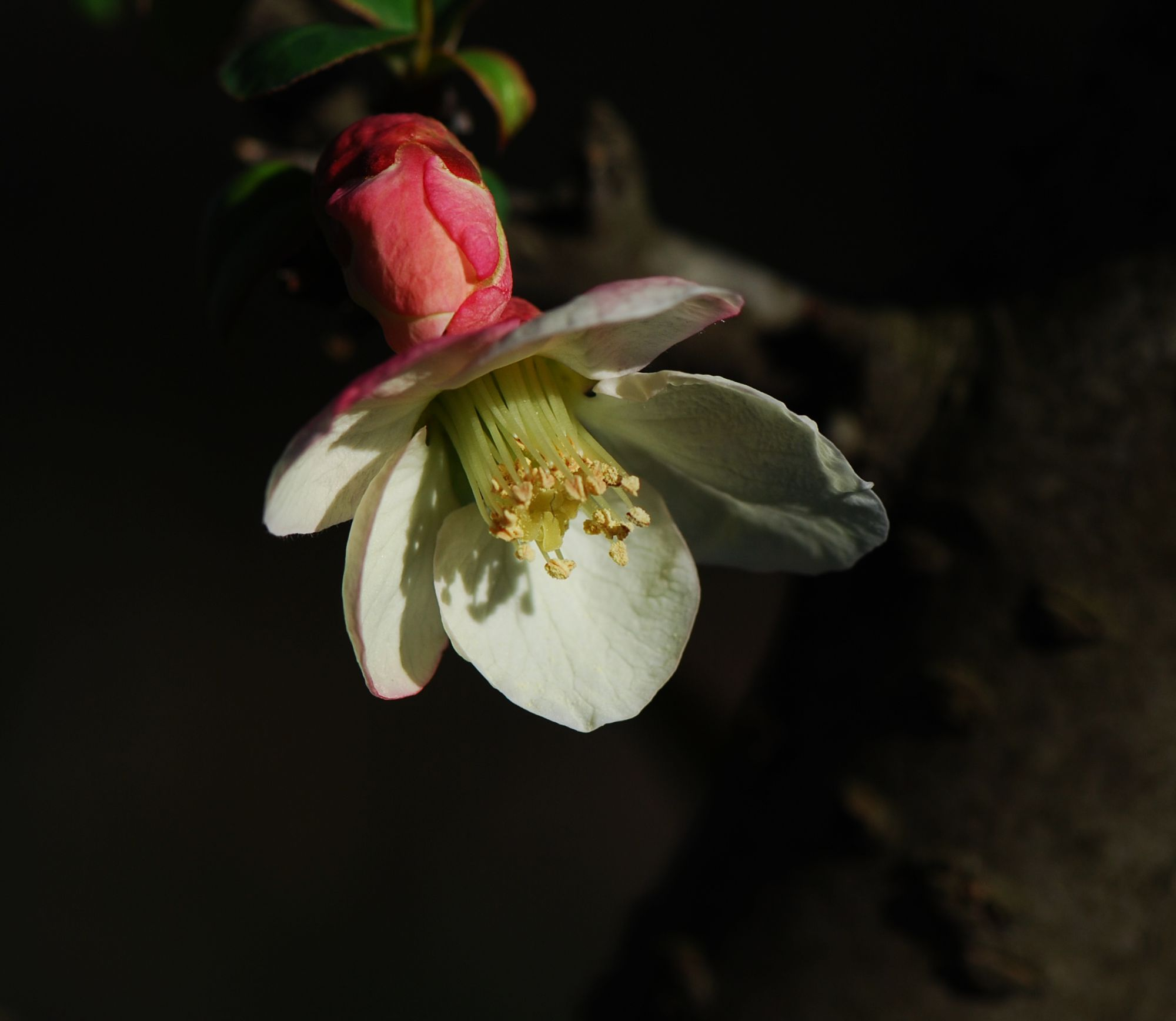 Chaenomeles cathayensis fleur, Jardin des Plantes de Paris